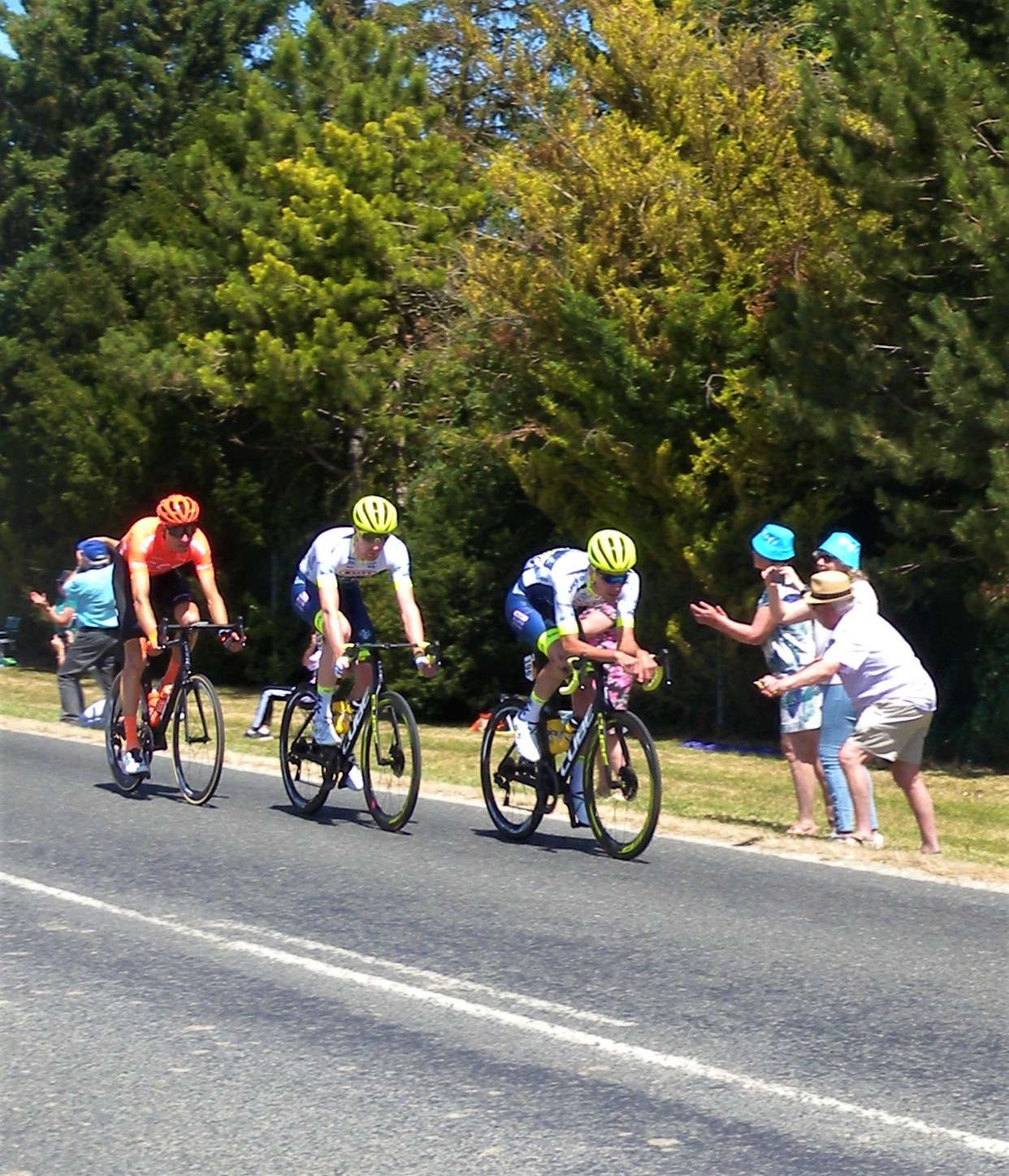 trio d'échappés